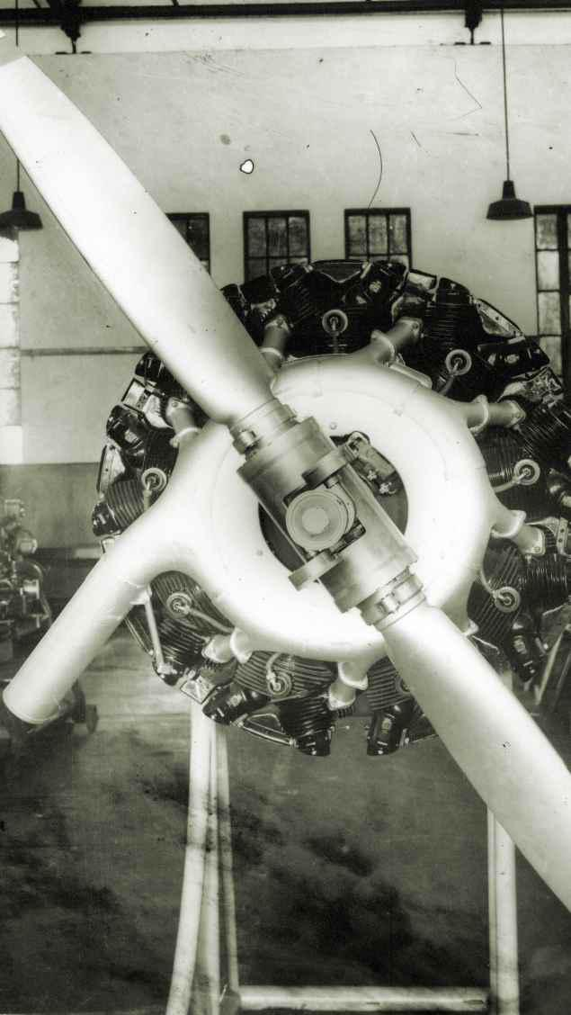 Motor I.Ae. 16 El Gaucho